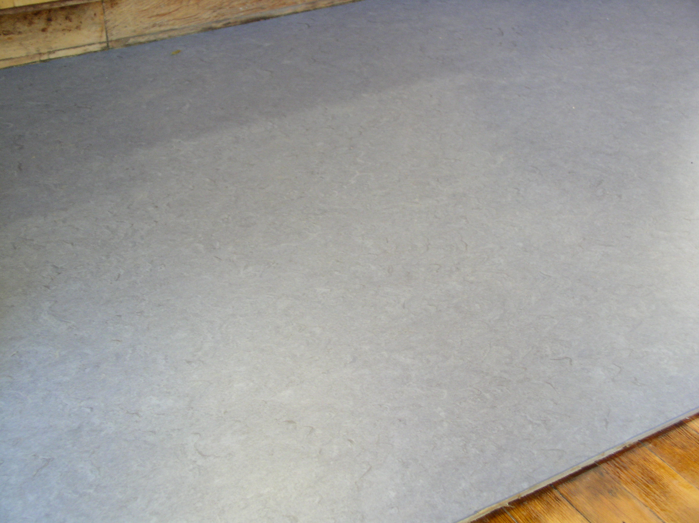 A linoleum floor